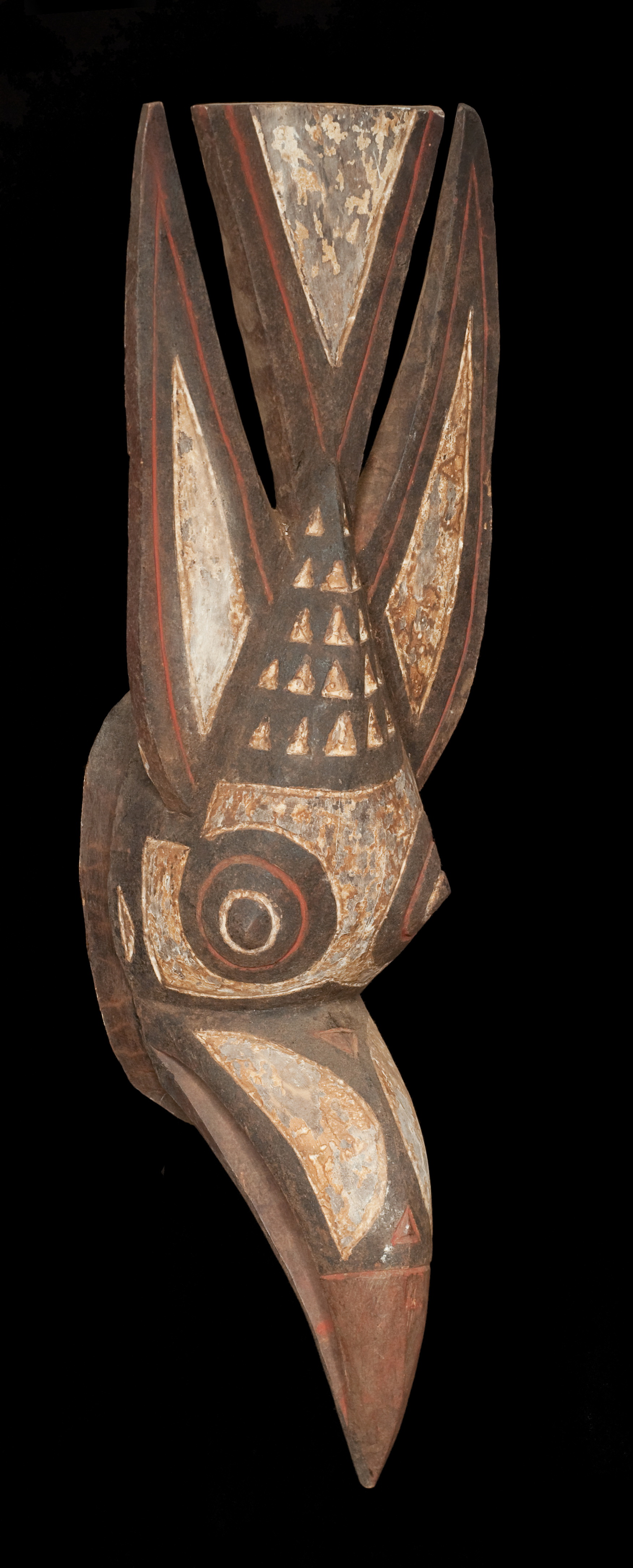 Masque de calao gourounsi (Nuna) du Burkina Faso